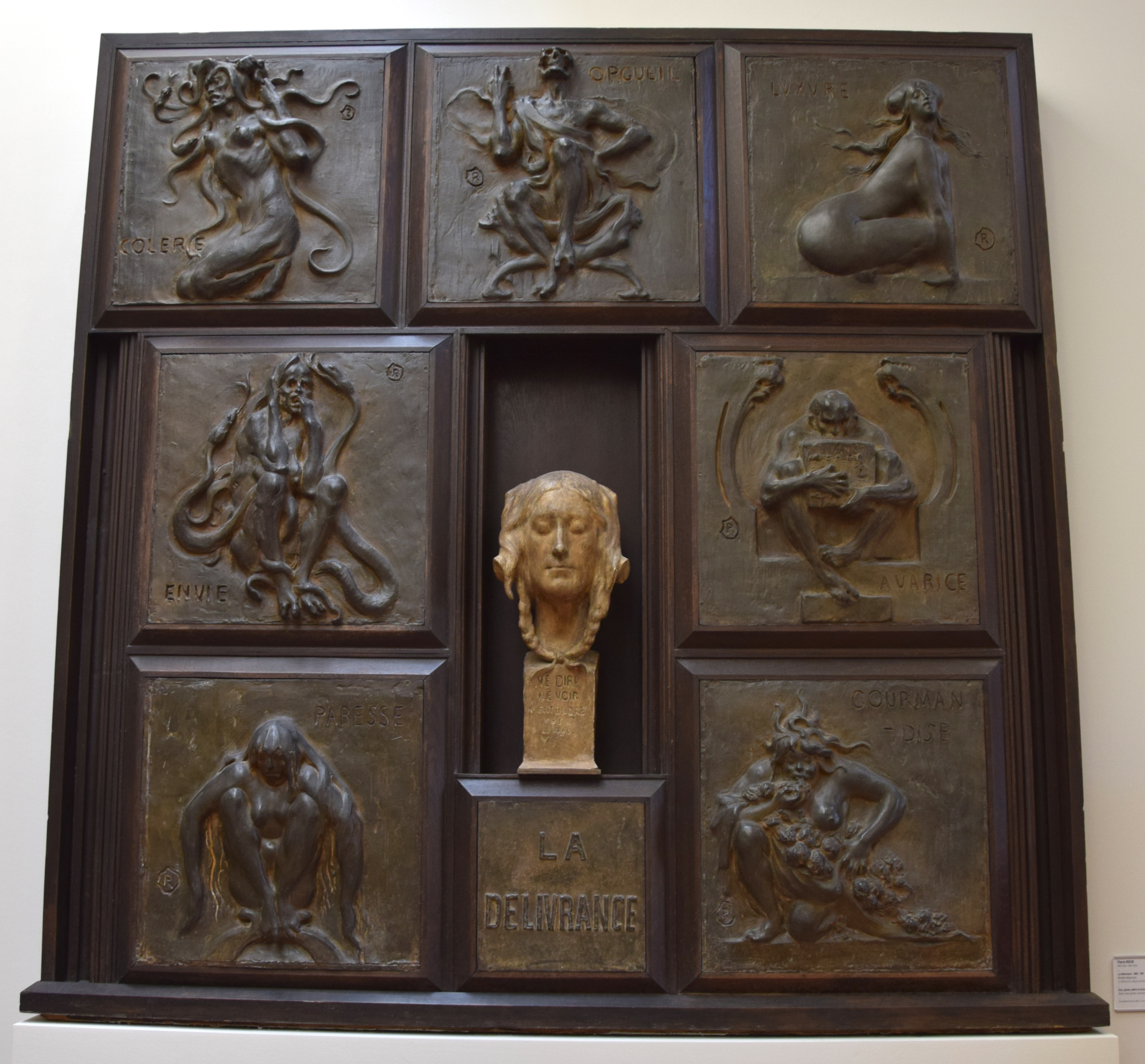 Sculptures in Musée d'Art et d'Industrie de Roubaix